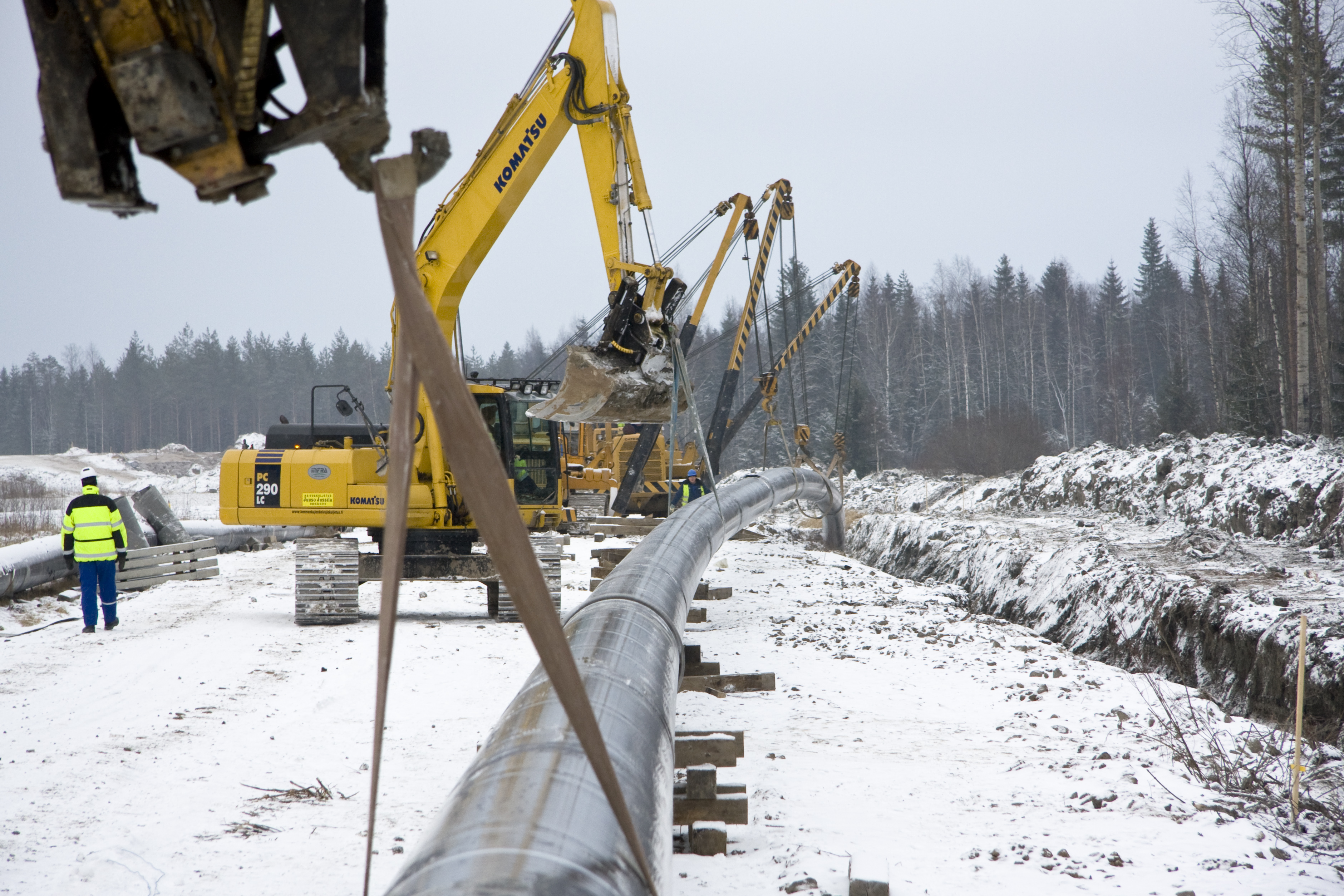 Maakaasuputkea lasketaan maahan Suomessa talvella 2007.